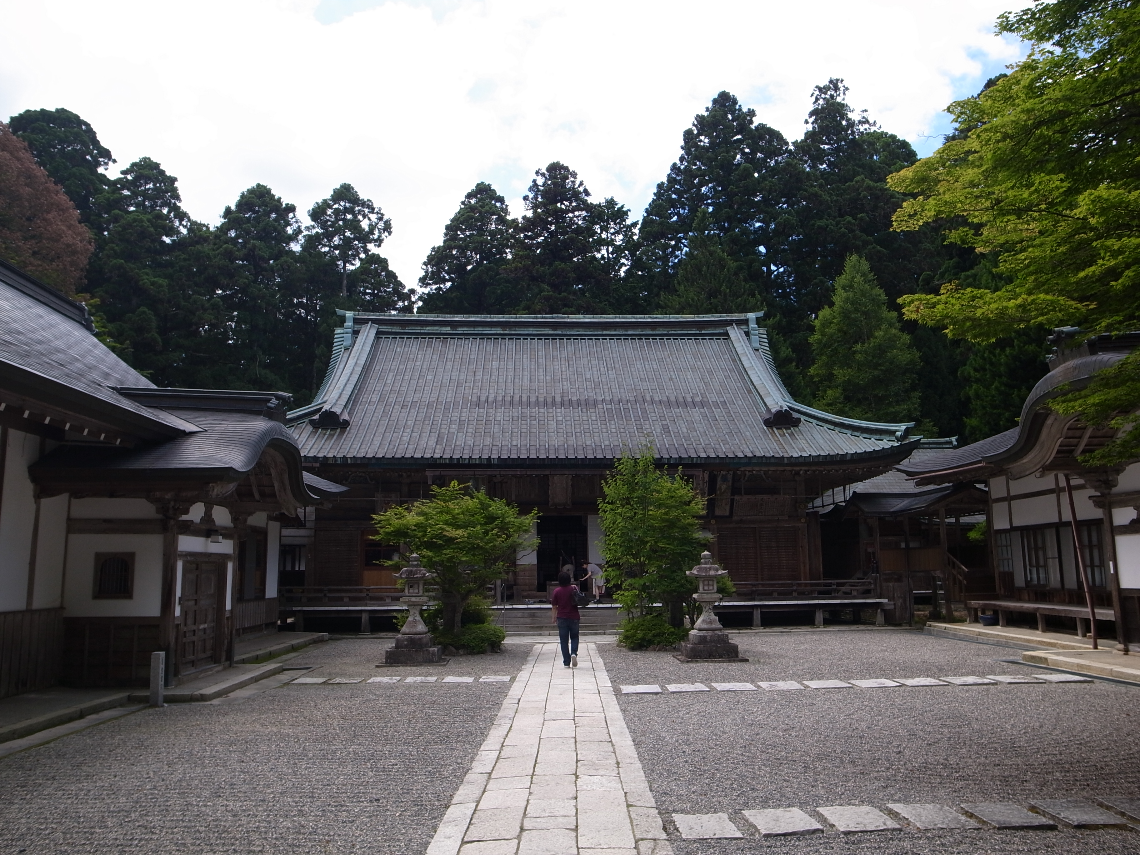 延暦寺